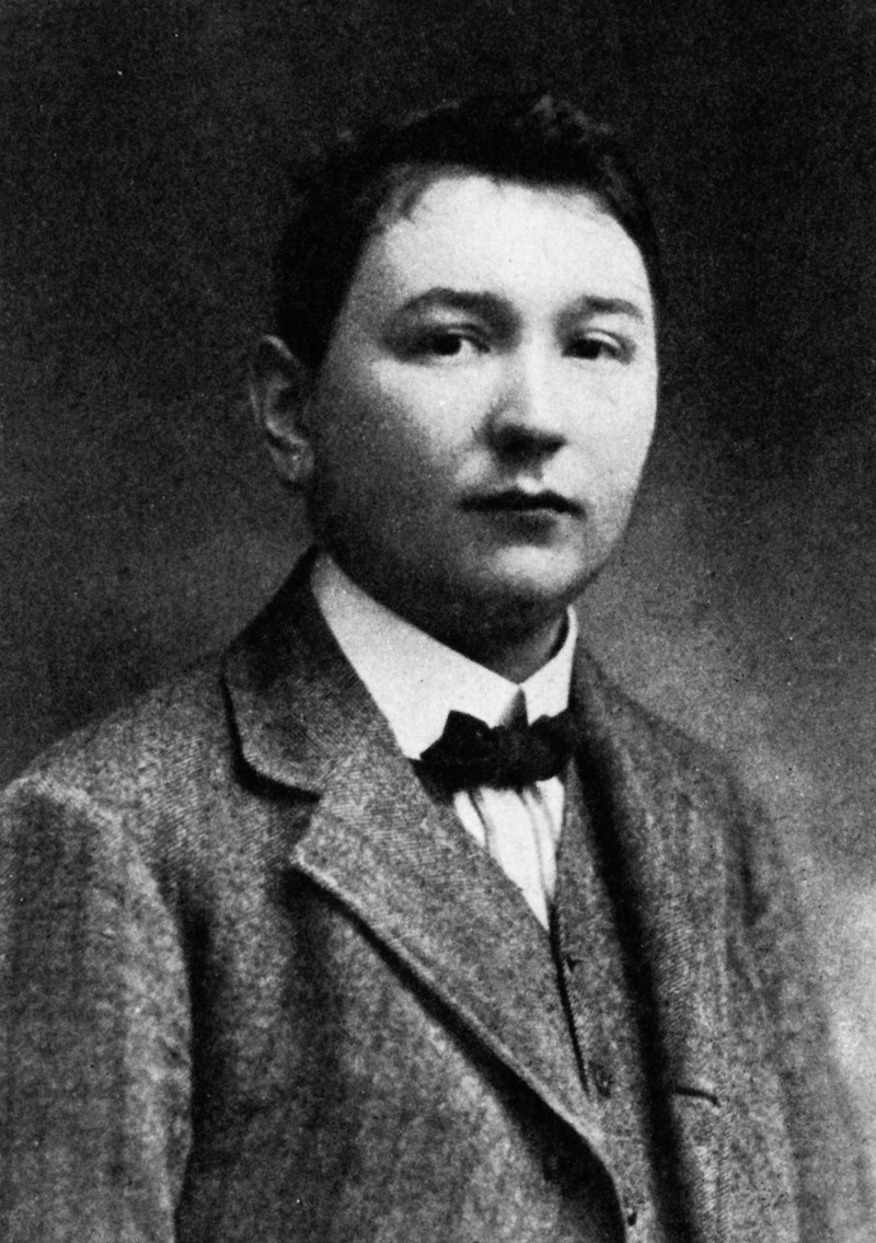 Ярослав Гашек